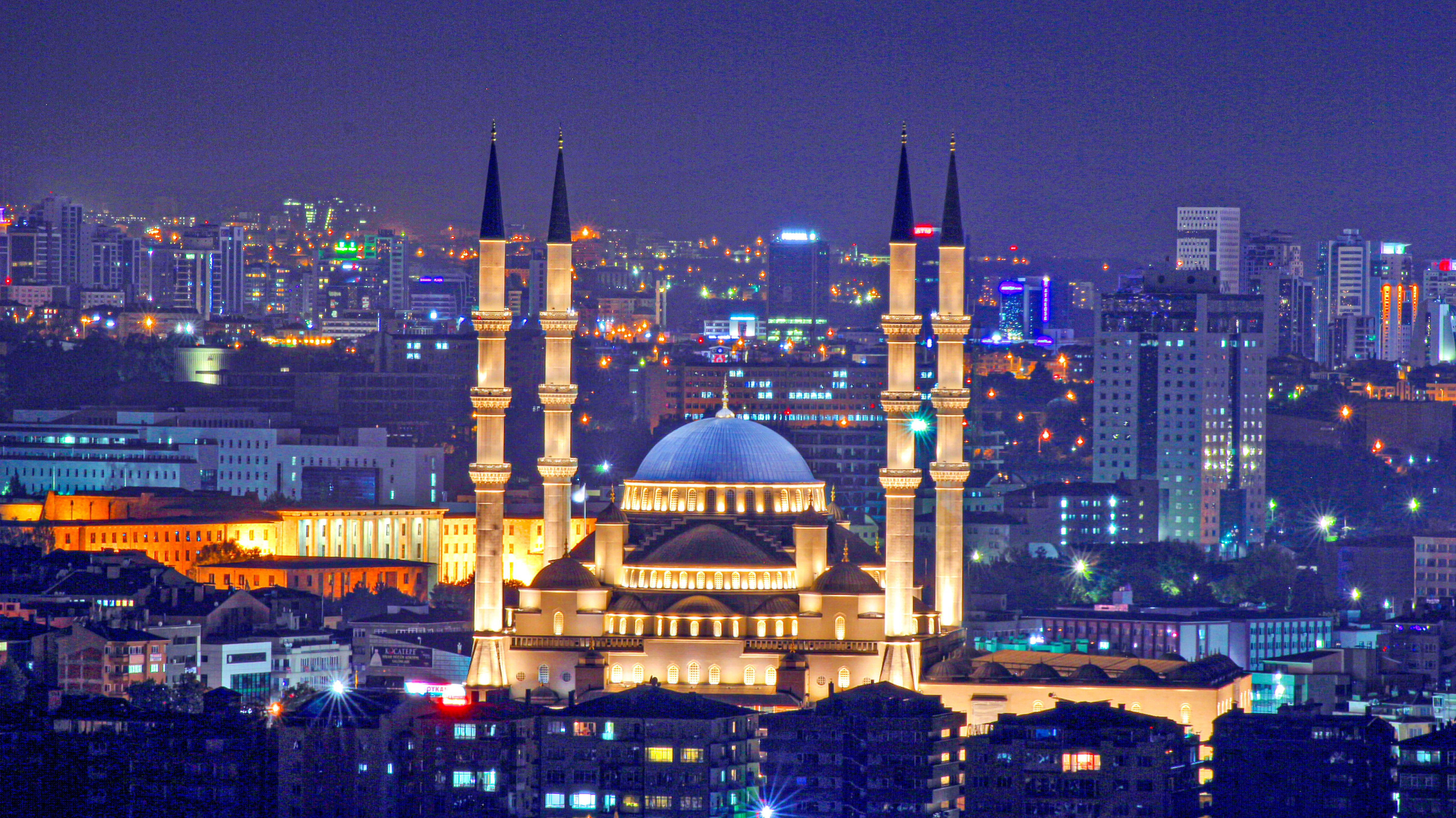 Ankara Kocatepe Camii